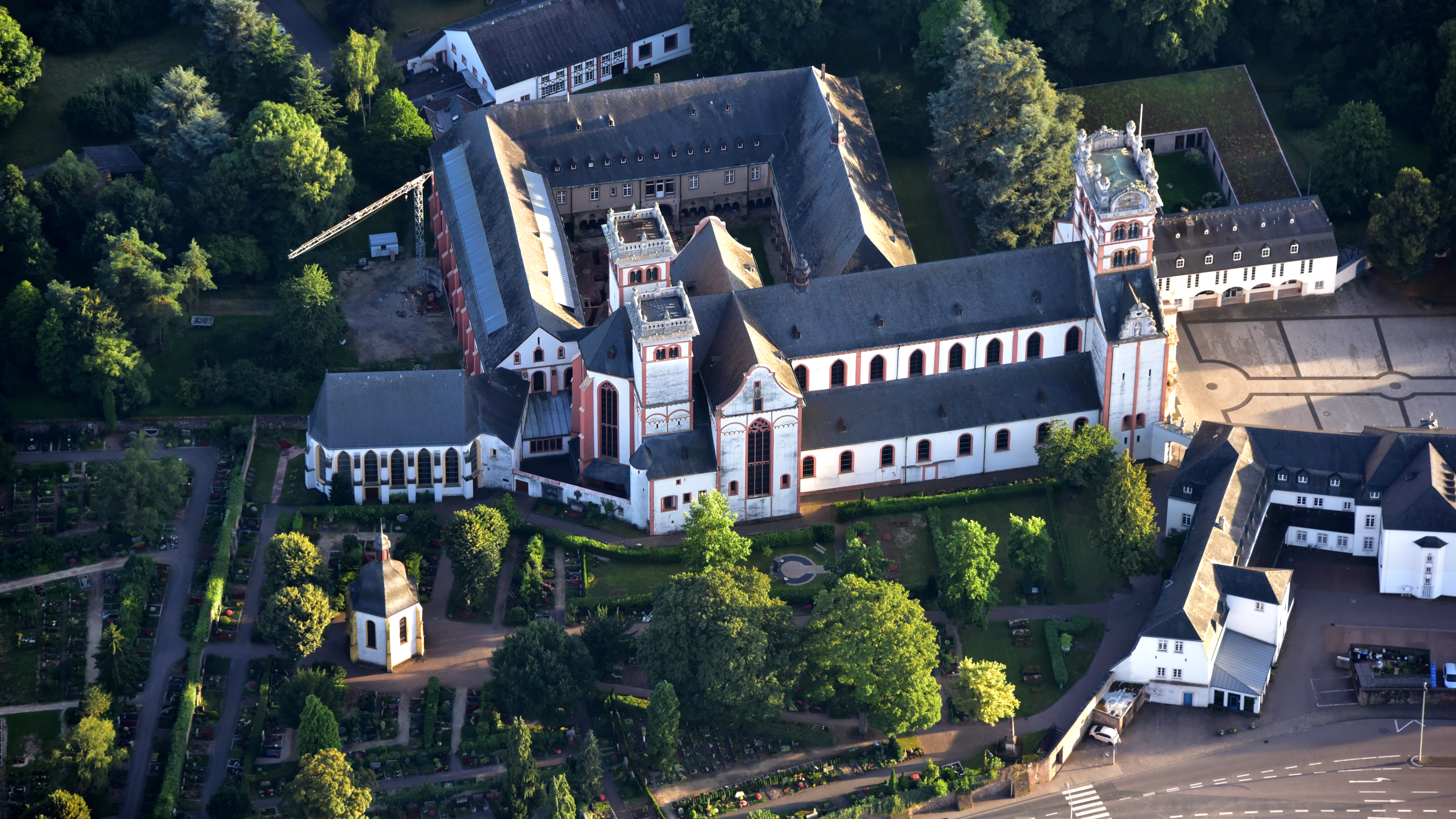 Trier, Benediktiner Abtei St. Matthias, Luftaufnahme (2016)